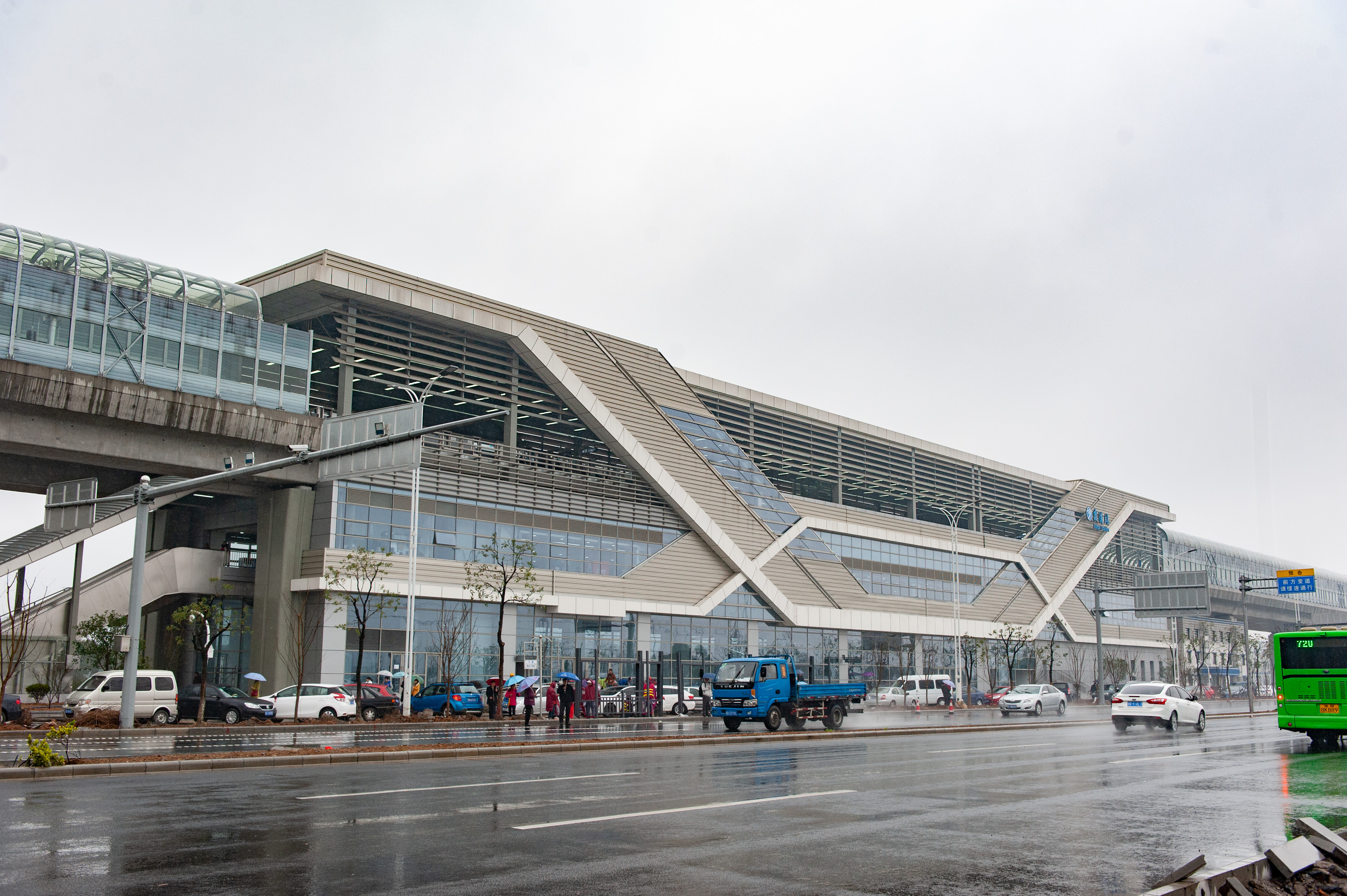 宁波地铁霞浦站